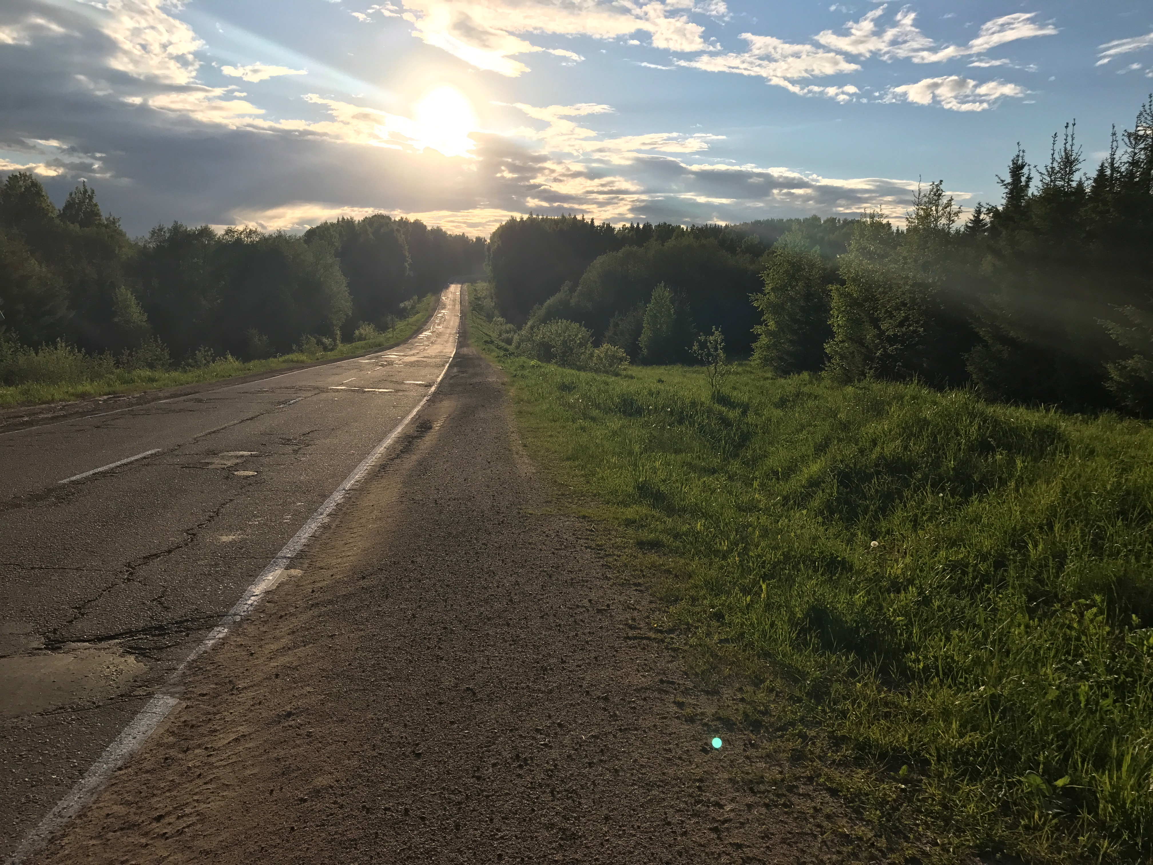 Старое Сандово